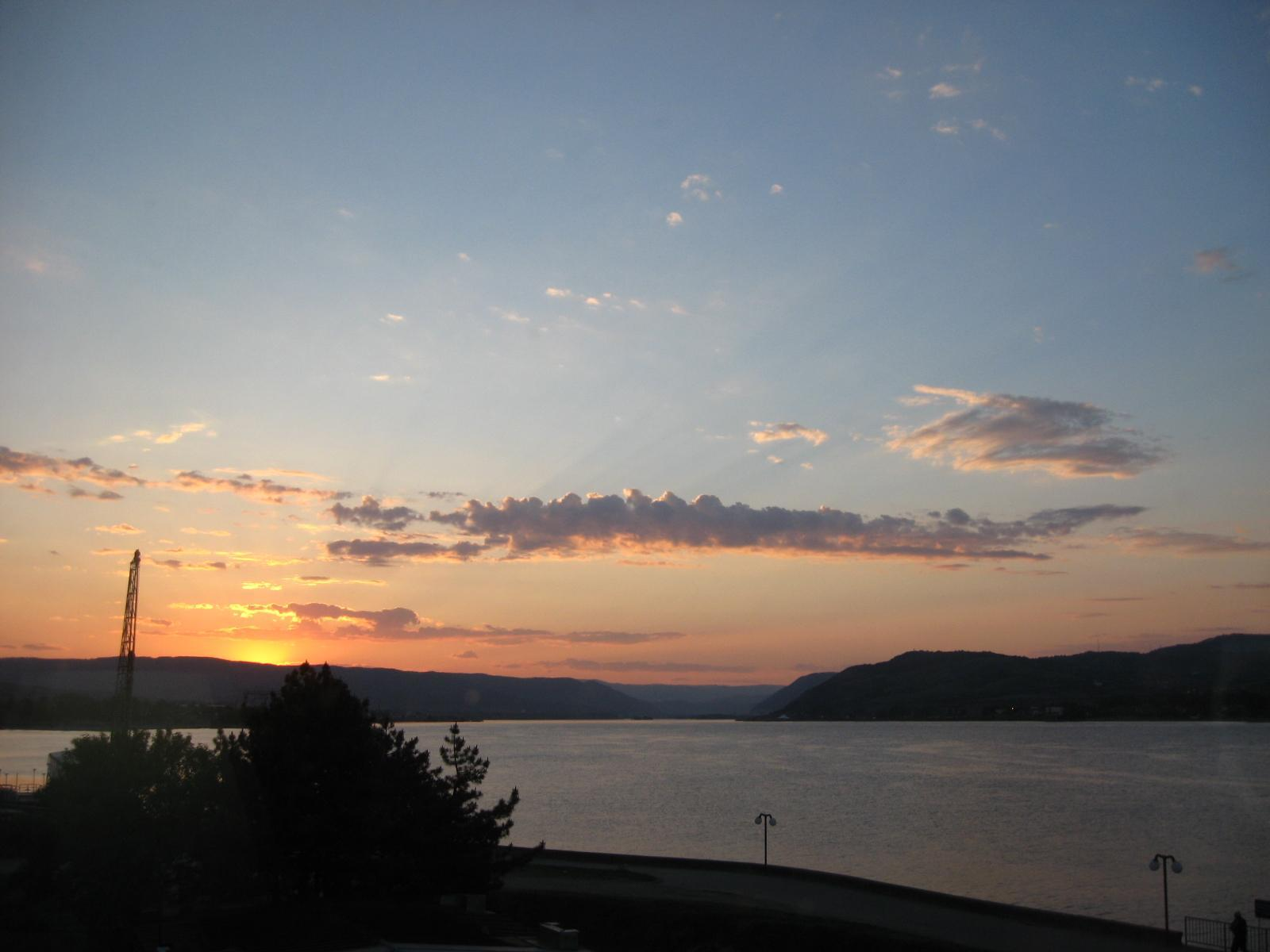 Драган Цветковић сопствена слика Кладово залазак сунца.